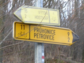 Cyklotrasa č. 11, přehrada Praha-Hostivař. Dopravní značky IS 19d "Směrová tabule pro cyklisty (s dvěma cíli)"